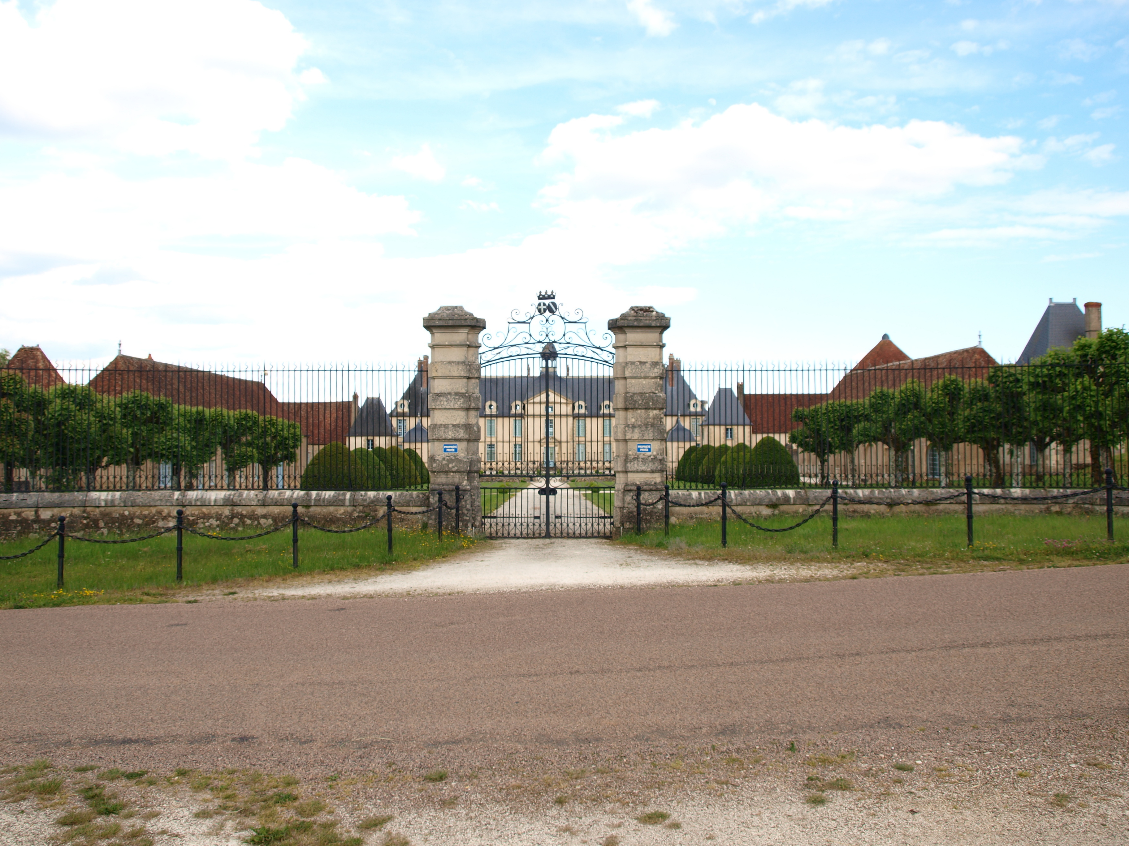 Château de Menou (Nièvre, France)